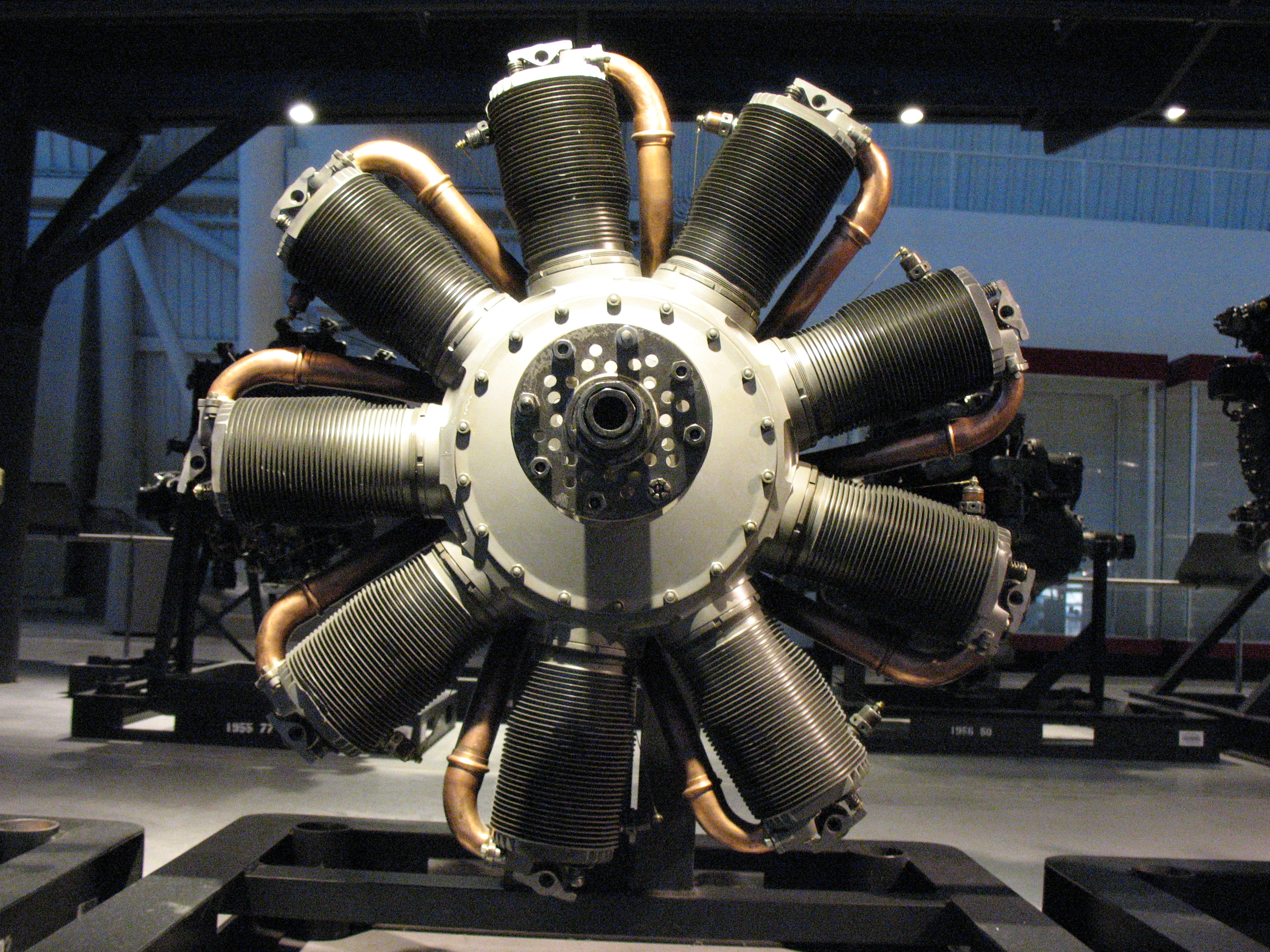 Le Rhone Model J